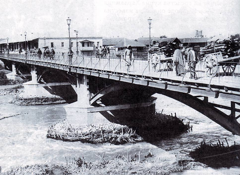 Ольгинский мост через р. Терек во Владикавказе. Начало XX в.